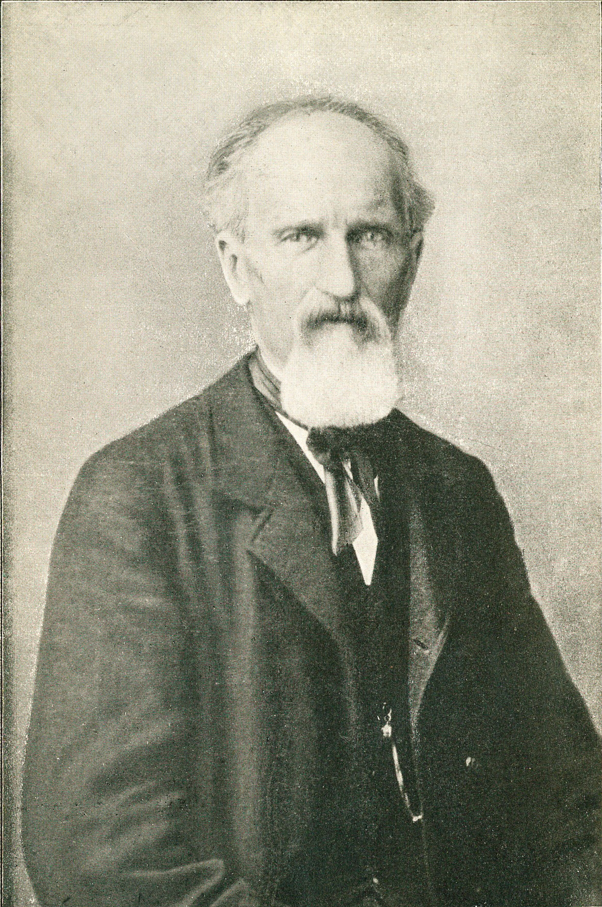 Giovanni Giordani (1822–1890), italienischer Arzt, Bergsteiger und Verfasser einer Ortsgrammatik von Alagna Valsesia.